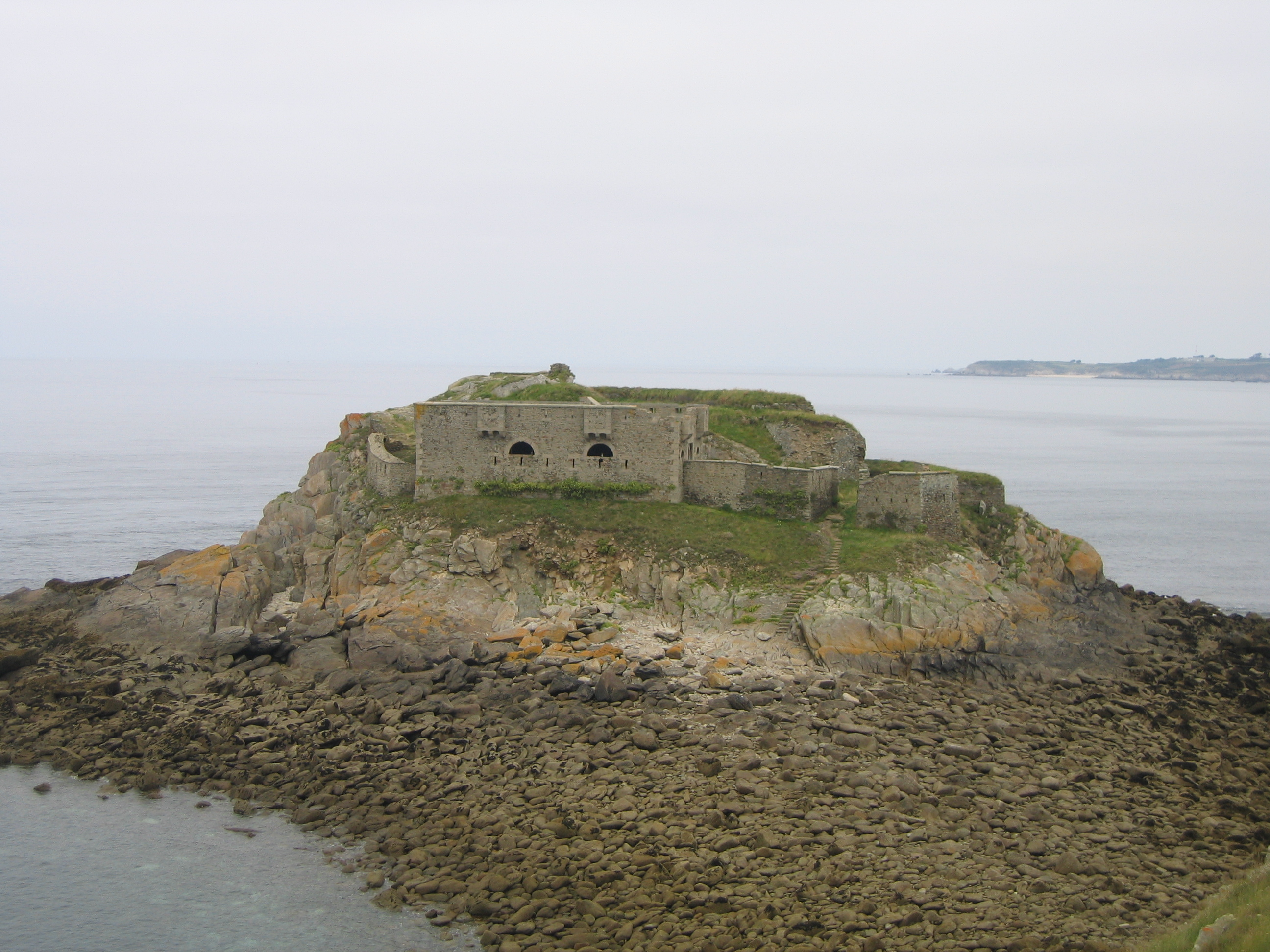 Le fort de l'Îlette de Kermorvan sur la presqu'île de Kermorvan